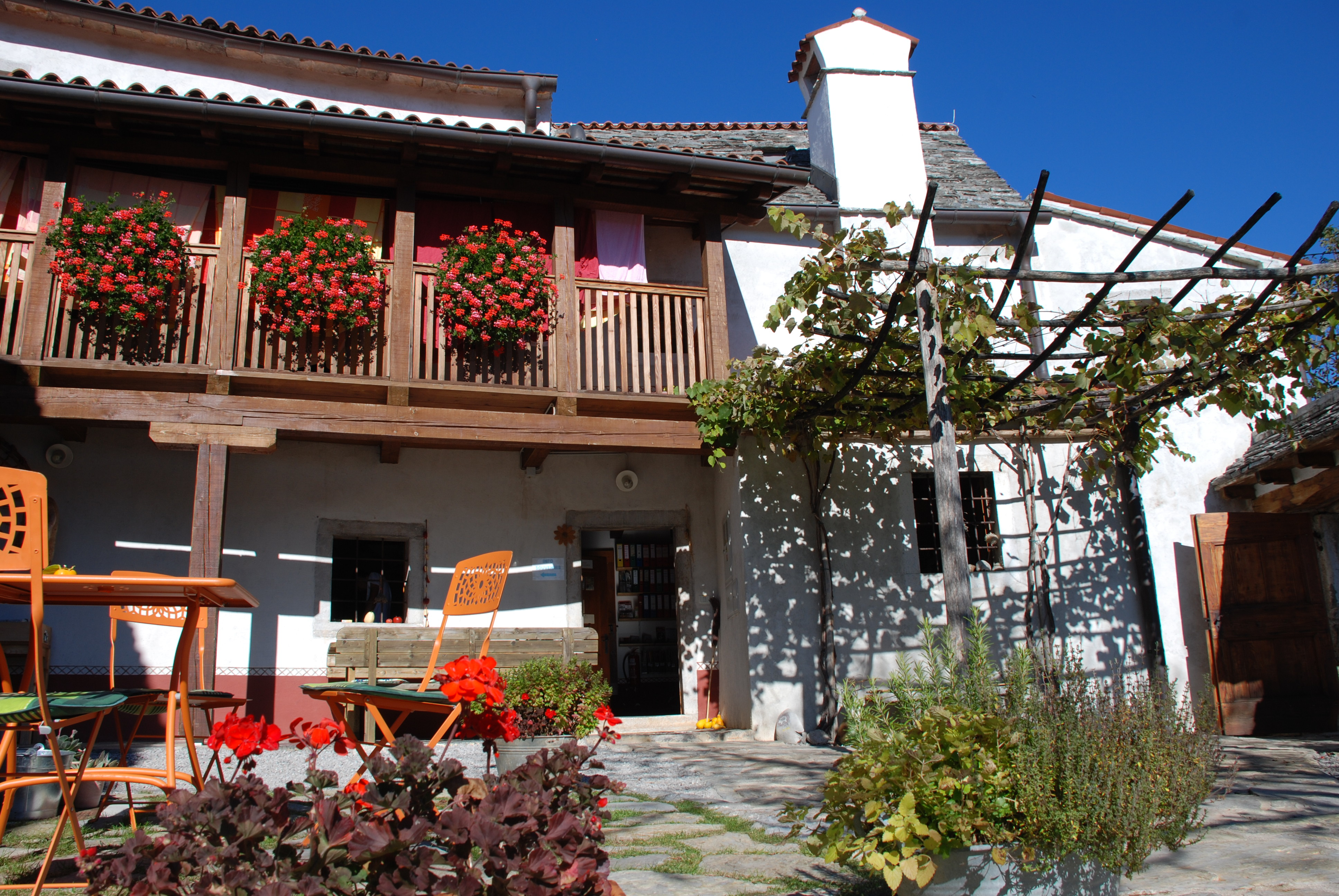 Mladinski hostel Pliskovica